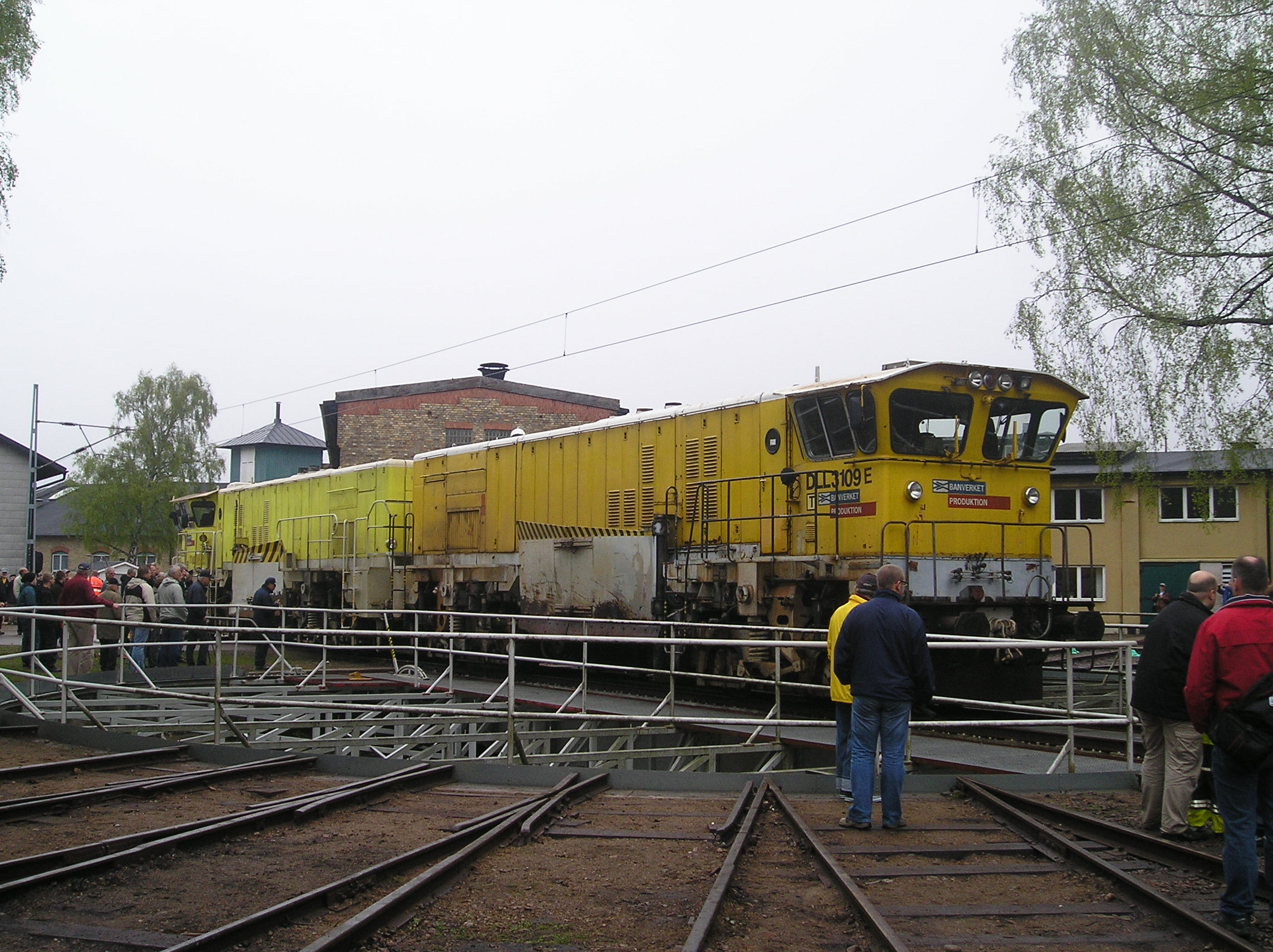 Service vehicle from Banverket on Järnvägens Museum Ängelholm.